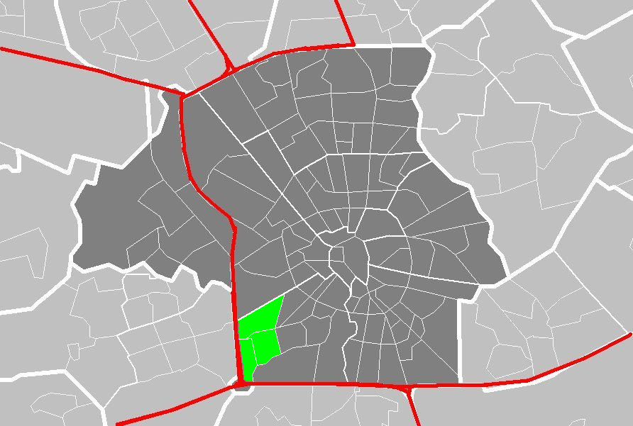 de wijk Oud Kasteel (stadsdeel Gestel) in Eindhoven